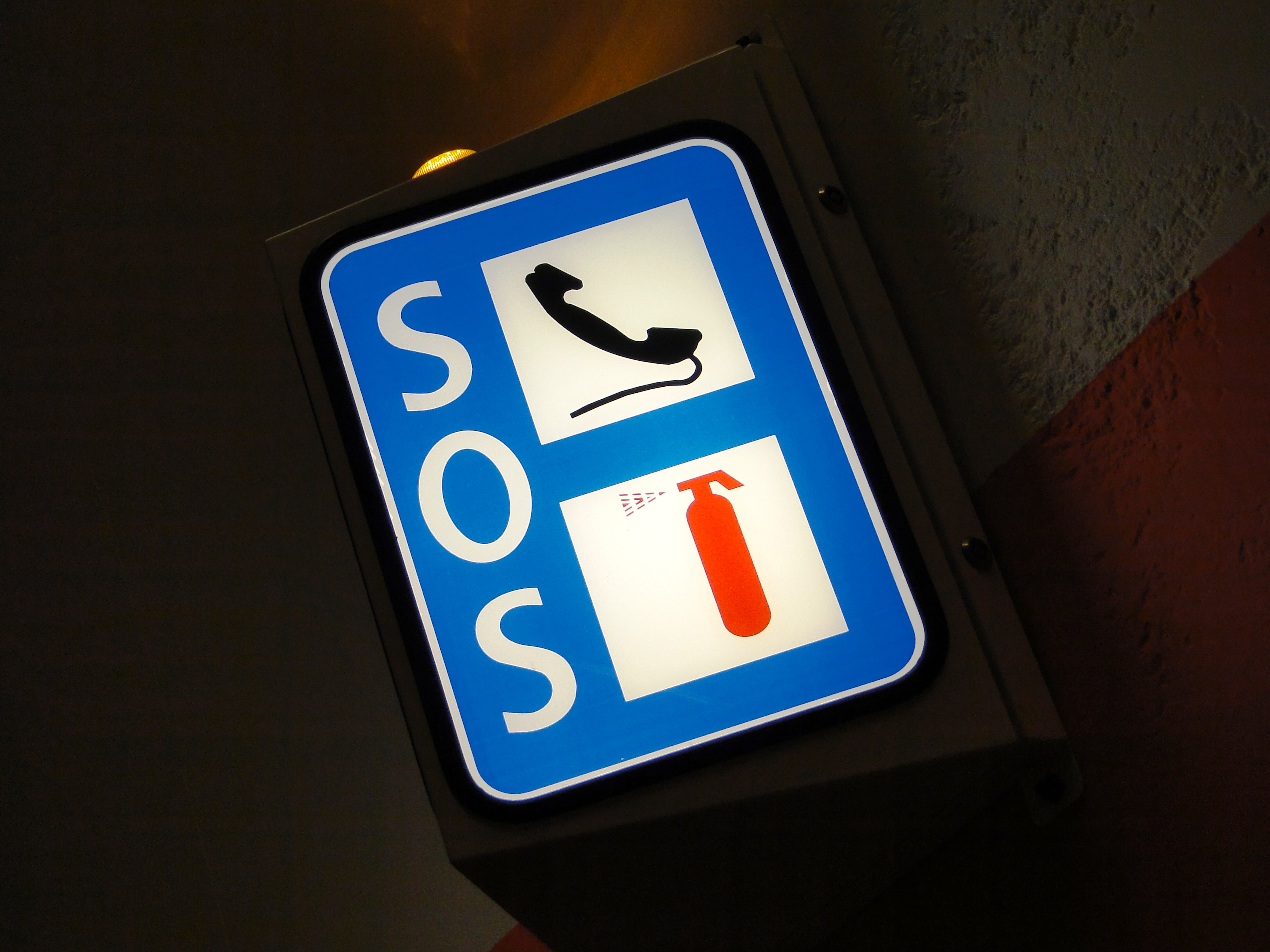 Verkéiersschëld E,30b / E,30a aus dem Lëtzebuerger Code de la route